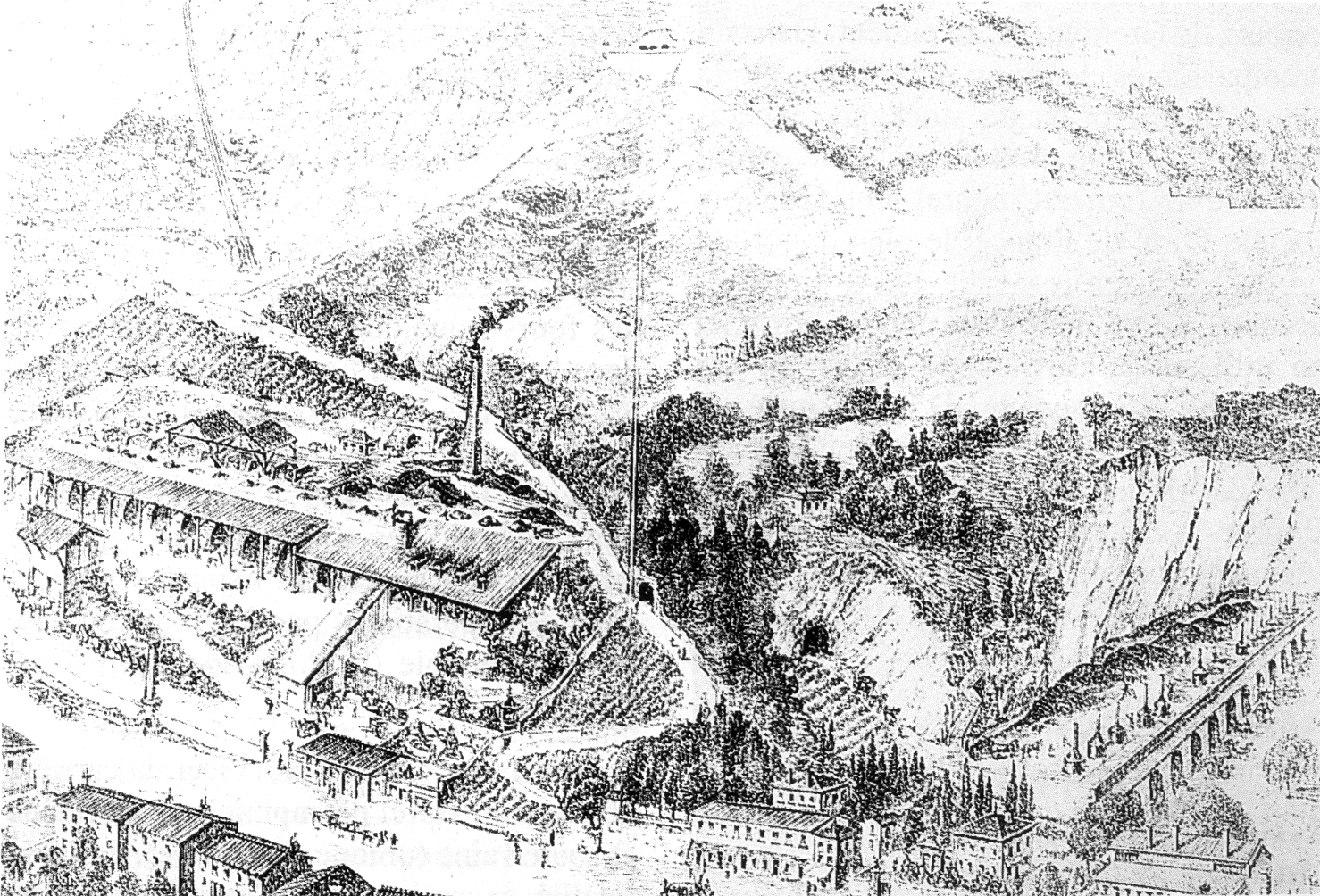 Vue d'ensemble des cimenteries de la porte de France, à Saint-Martin-le-Vinoux.